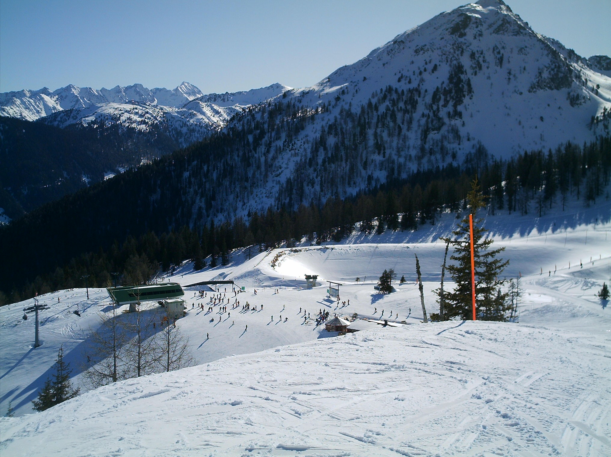 Aussicht auf Sepp'n Jet Reiteralmbahn II (Bergstation)/ Schober (2133m) - Schigebiet Reiteralm